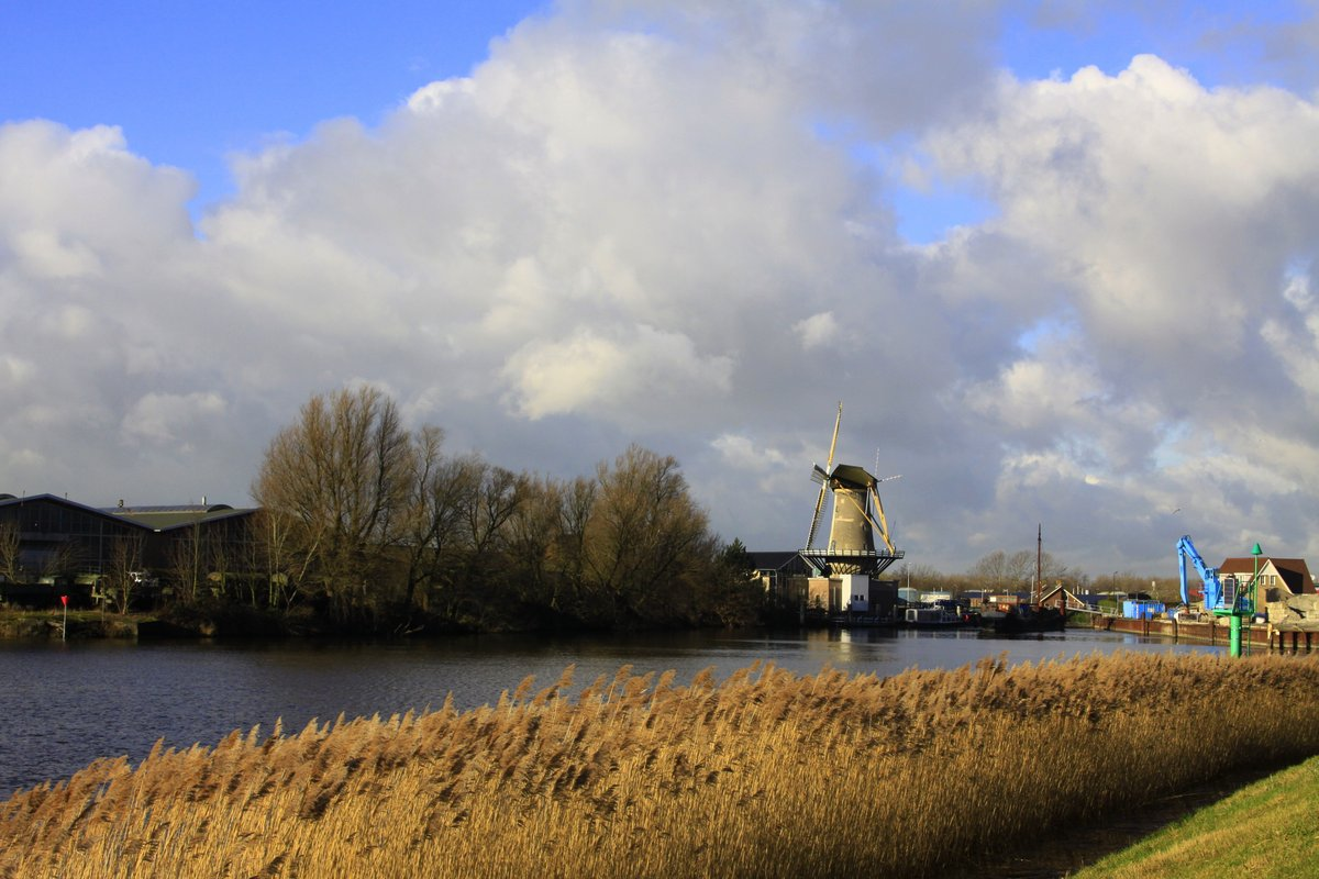 Aan de overkant van de Hollandse IJssel zien we het buurtschap Kortenoord met Molen Windlust.. gezien vanuit IJssellaan.